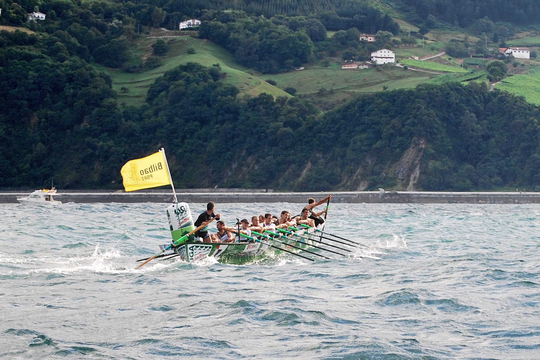 Virage autour de la bouée du large d'un trainière en compétition lors du Drapeau de Zarautz (2010)